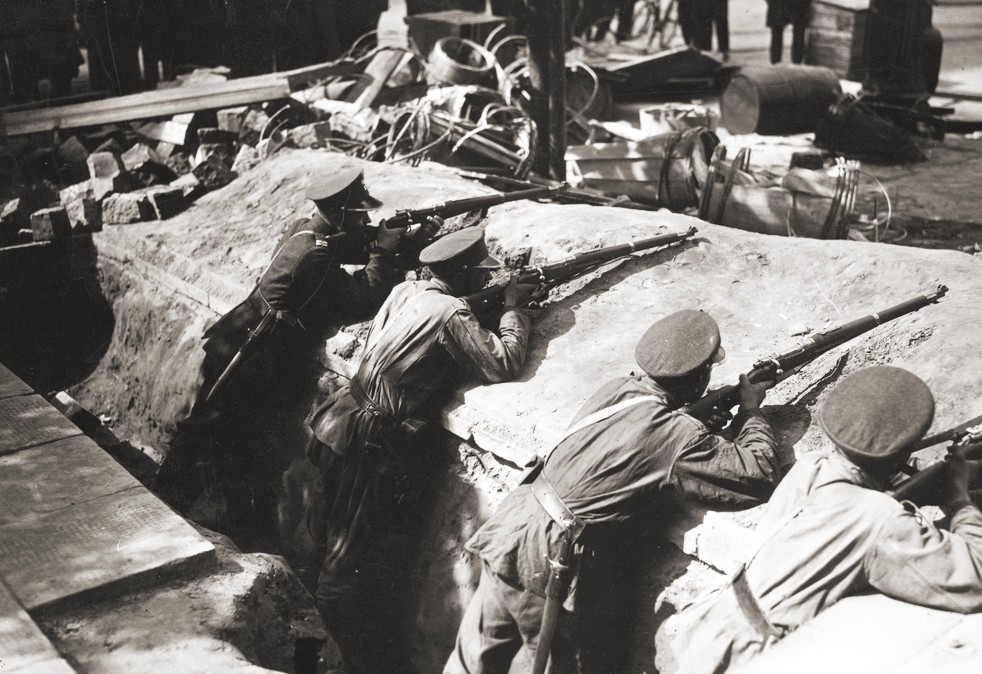 Żołnierze 7. pułku ułanów, strzelający z karabinów w okopach pod Belwederem podczas zamachu majowego.